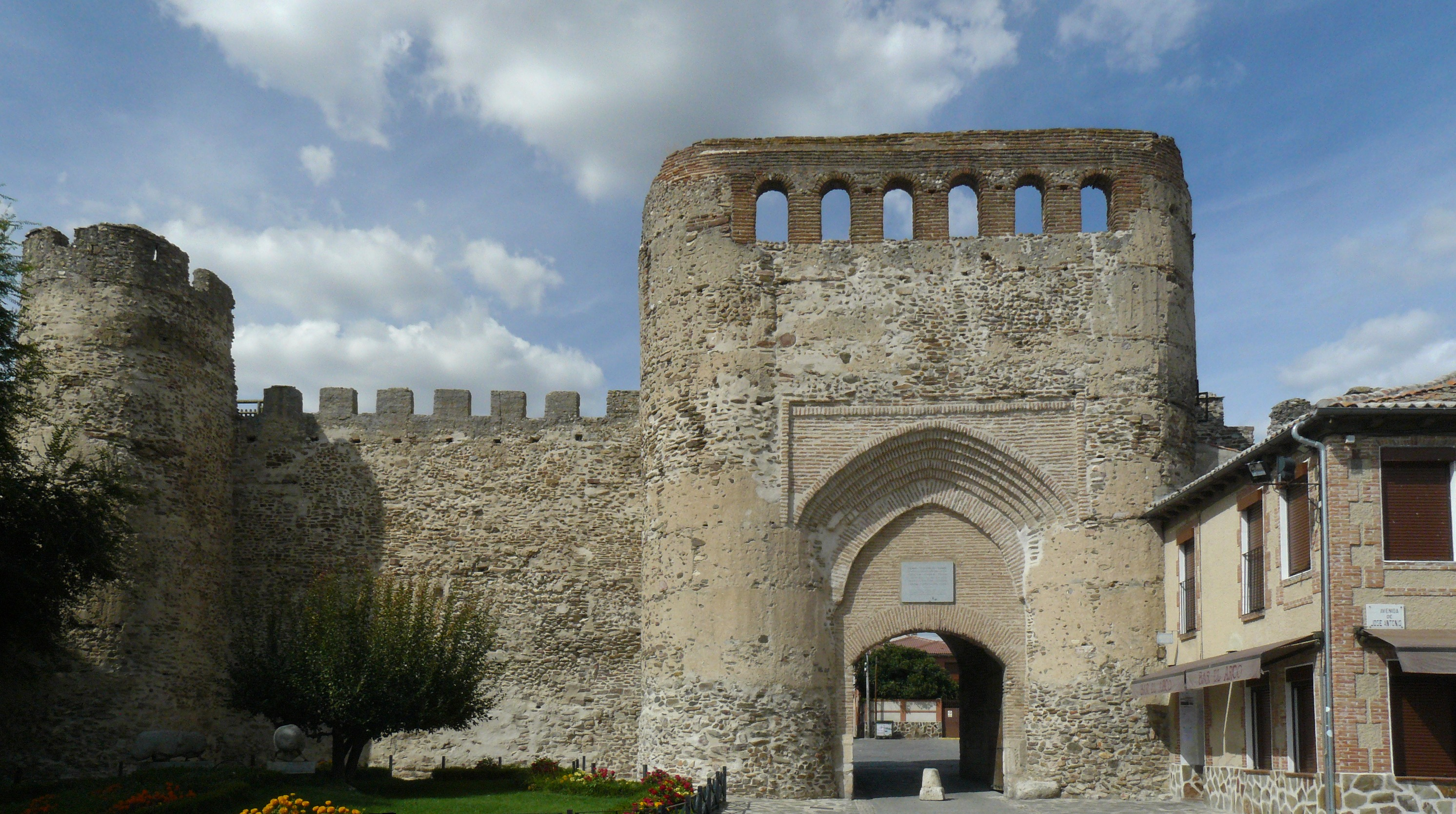 Vista de la puerta de la muralla de Coca, (Segovia).